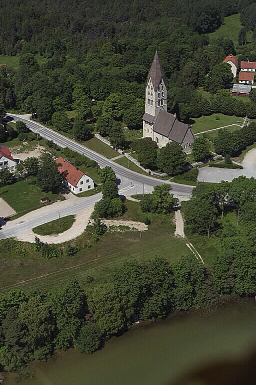 Motiv: Tingstäde kyrka Nyckelord: Flygbilder, Riksintressen Kategori: Kyrkomiljö Tingstäde kyrka. Länsväg 148 går förbi söder om kyrkan.